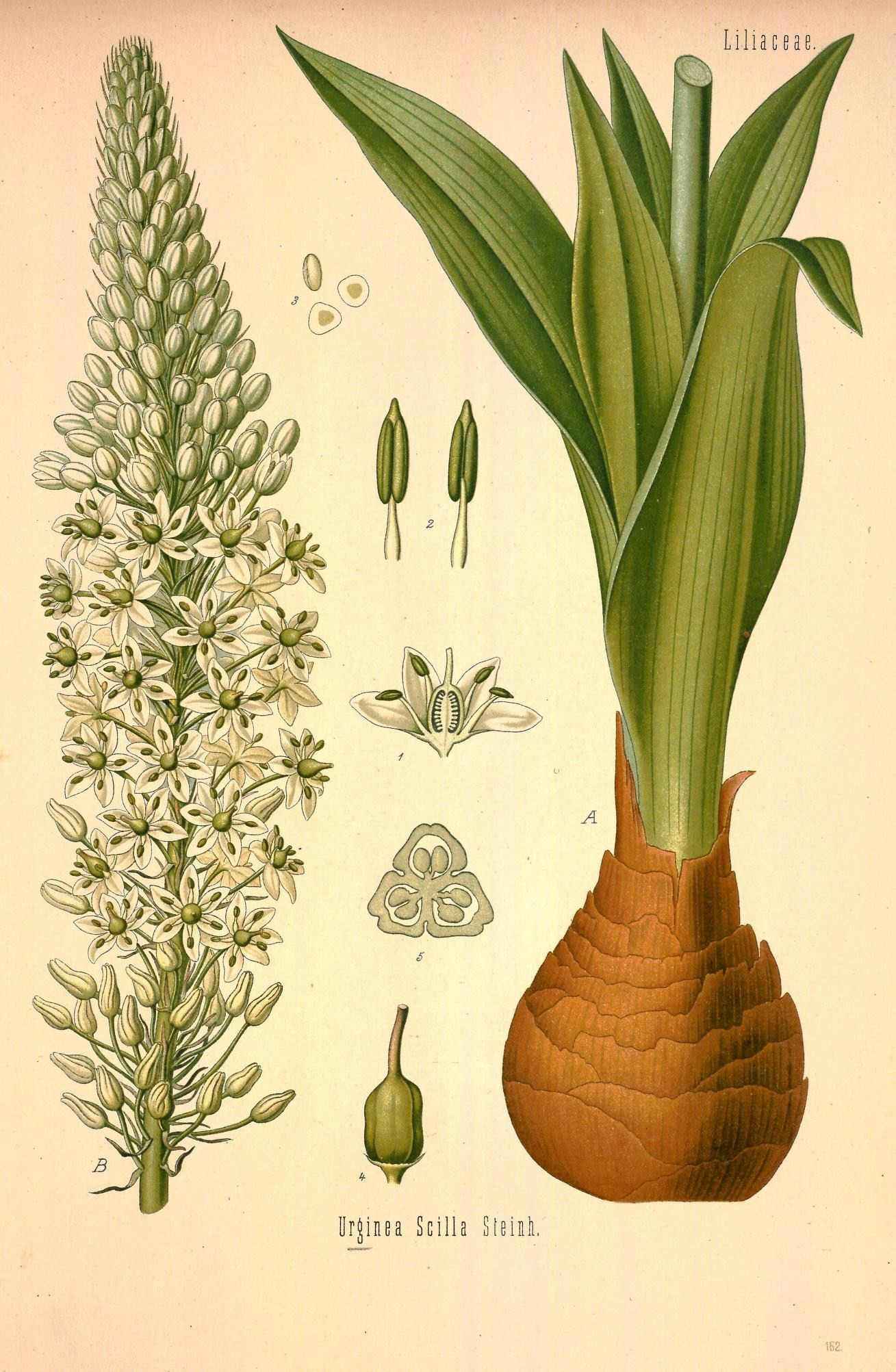 Weiße Meerzwiebel. A B Theile der Pflanze in natürlicher Grösse. 1. Blüthe im Längsschnitte, etwas vergrössert; 2. Staubgefässe, vergrössert; 3. Pollen, desgl.; 4. Stempel, desgl.; 5. Fruchtknoten im Querschnitt, desgl.